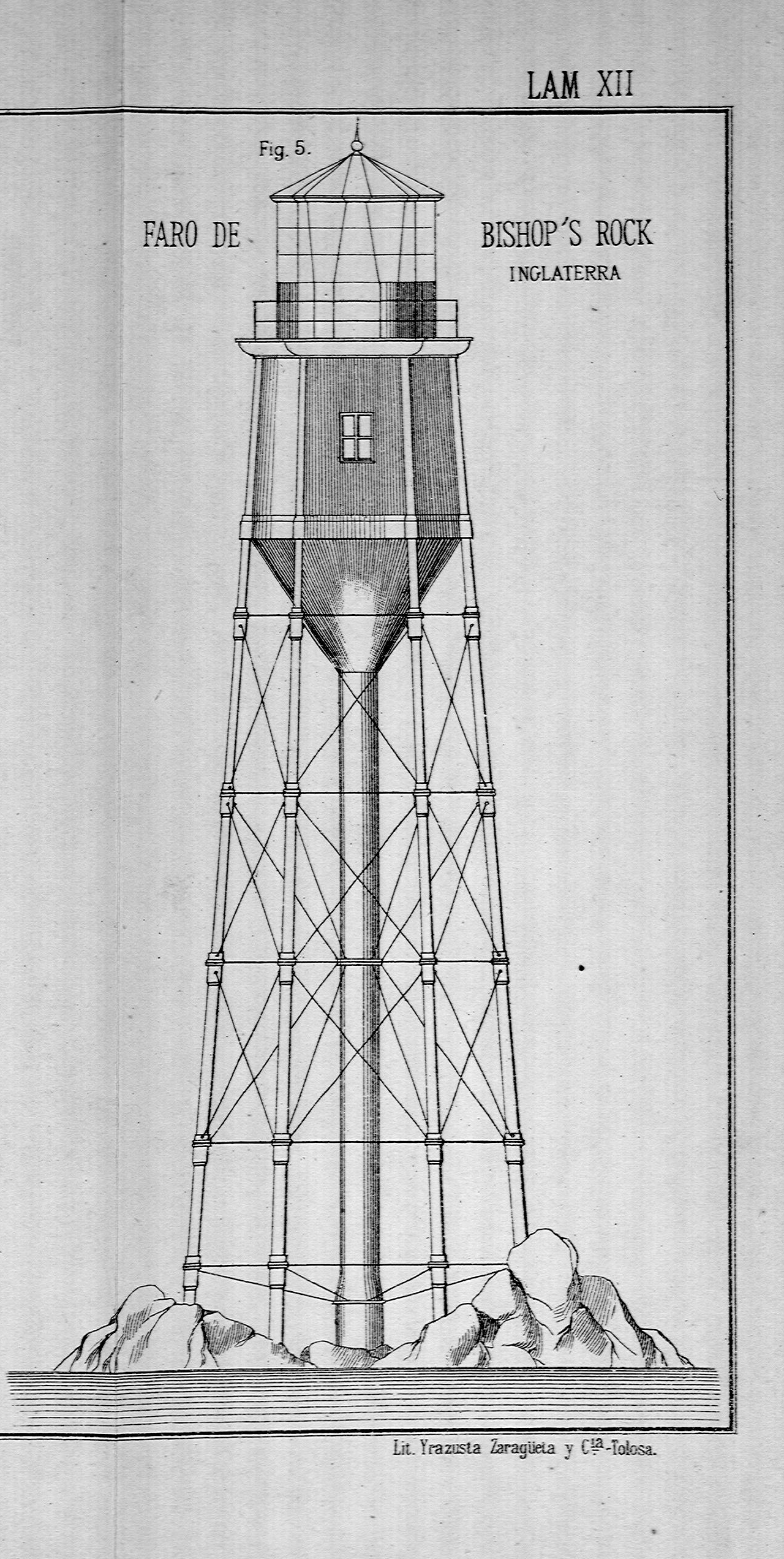 Detalle del Faro de Bishop Rock en Inglaterra según una lamina del libro Puentes de hierro económicos, muelles y faros sobre palizadas y pilotes mecánicos. Madrid: Librería Editorial de Bailly-Bailliere e Hijos